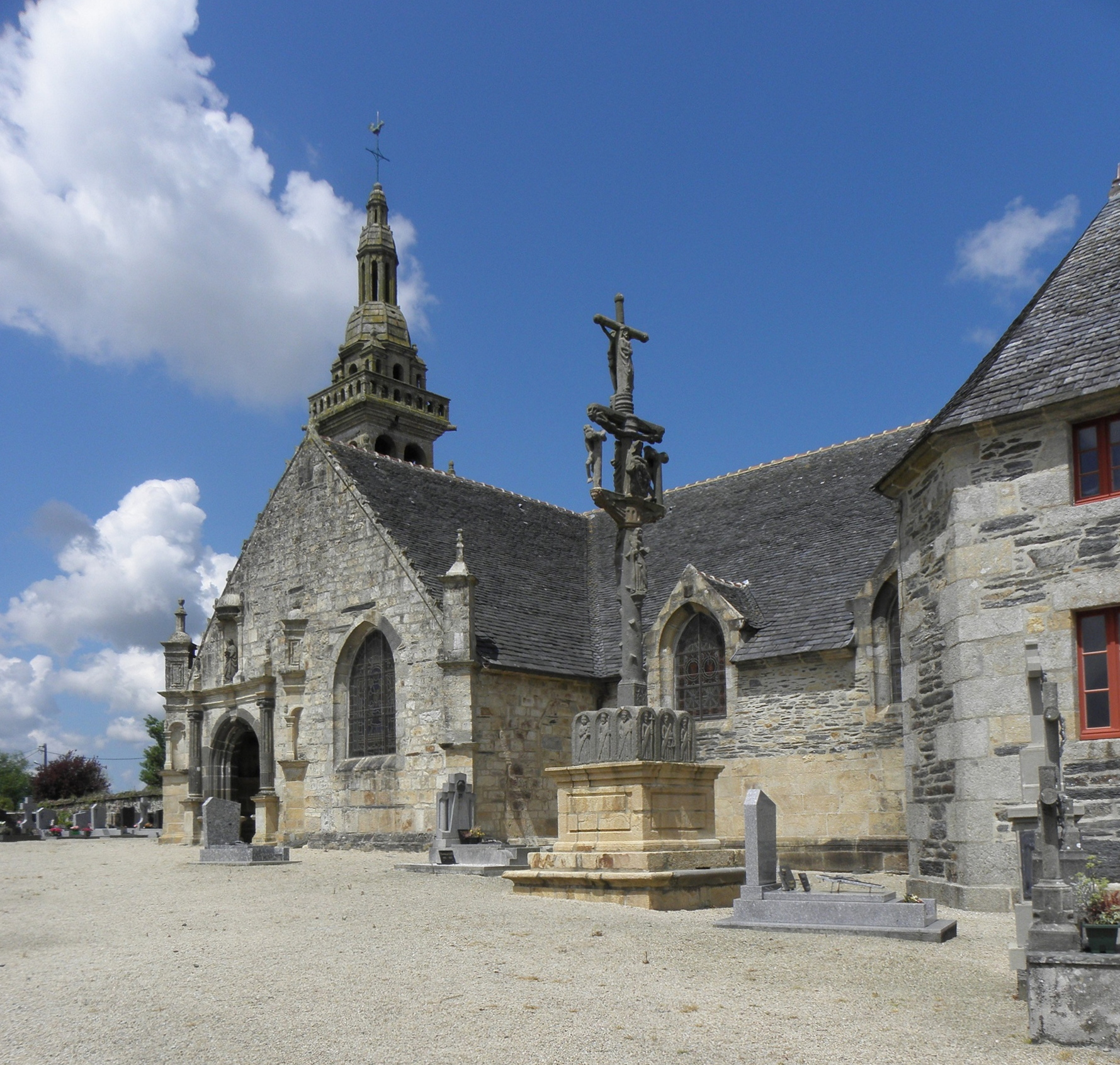 Église Sainte-Pitère du Tréhou (29). Calvaire et flanc sud.